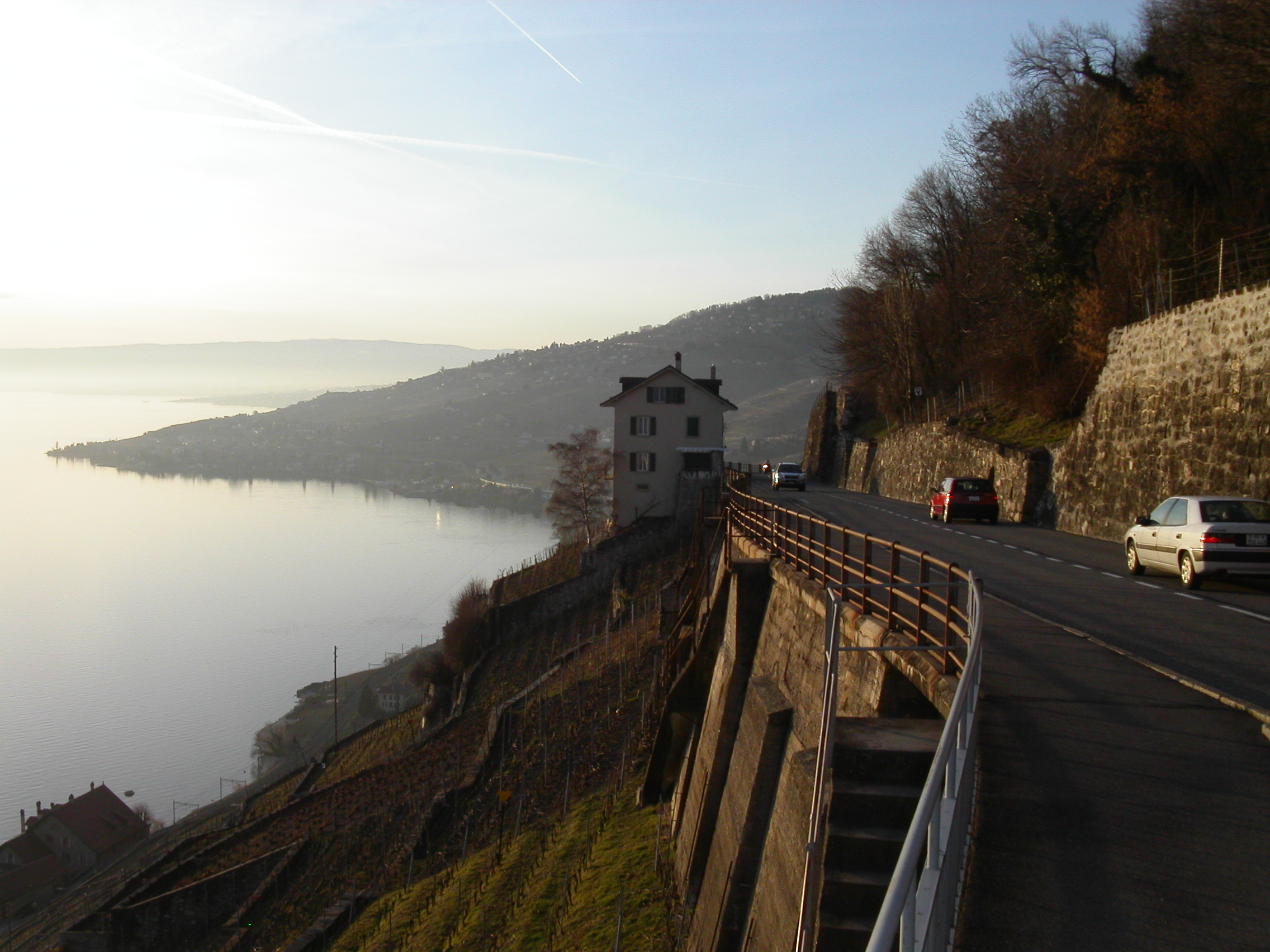 Le Lauvaux et le lac Léman